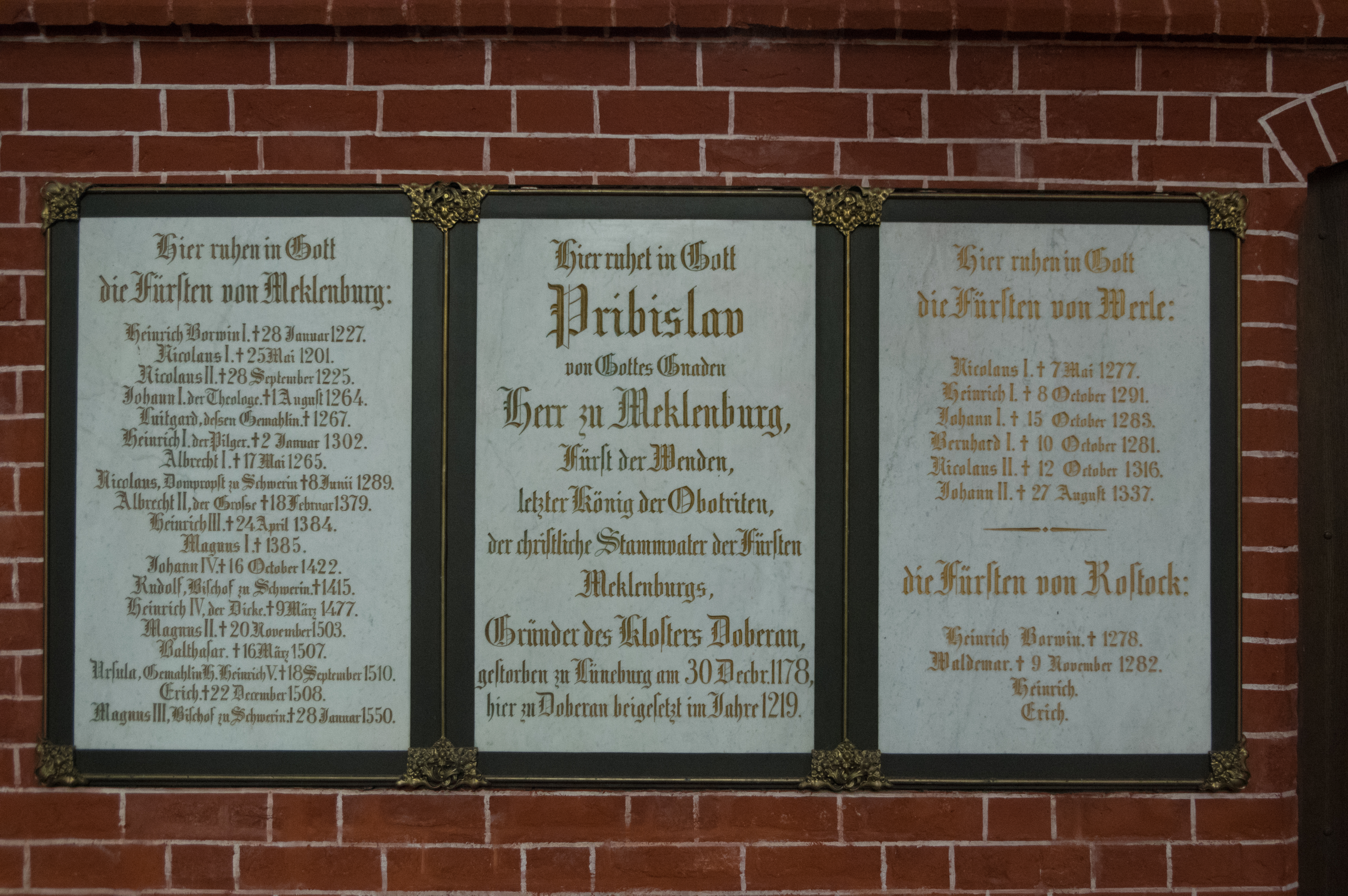 Bad Doberan in Mecklenburg-Vorpommern. Der Dom uns somit das Innere steht unter Denkmalschutz.